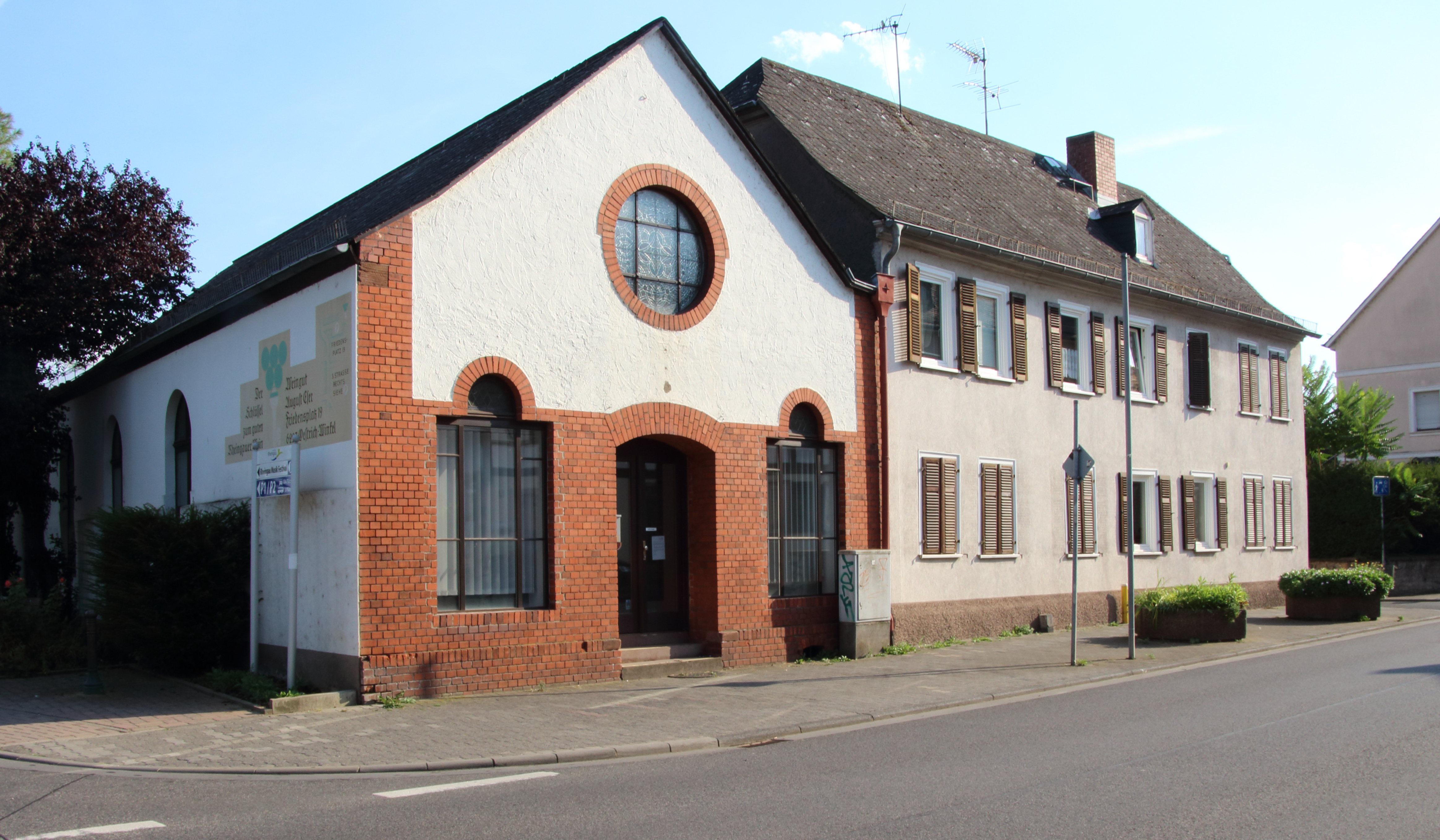 Ehemaliger Evangelischer Betsaal und Pfarrhaus. Pfarrhaus um 1800 als Wohnhaus entstanden. Die angrenzende, um 1890 entstandene Winzerhalle wurde 1893 zum Betsaal umgestaltet. Nutzung bis zur Errichtung der Evangelischen Kirche in Mittelheim 1957. Rheingaustr 21, Oestrich im Rheingau